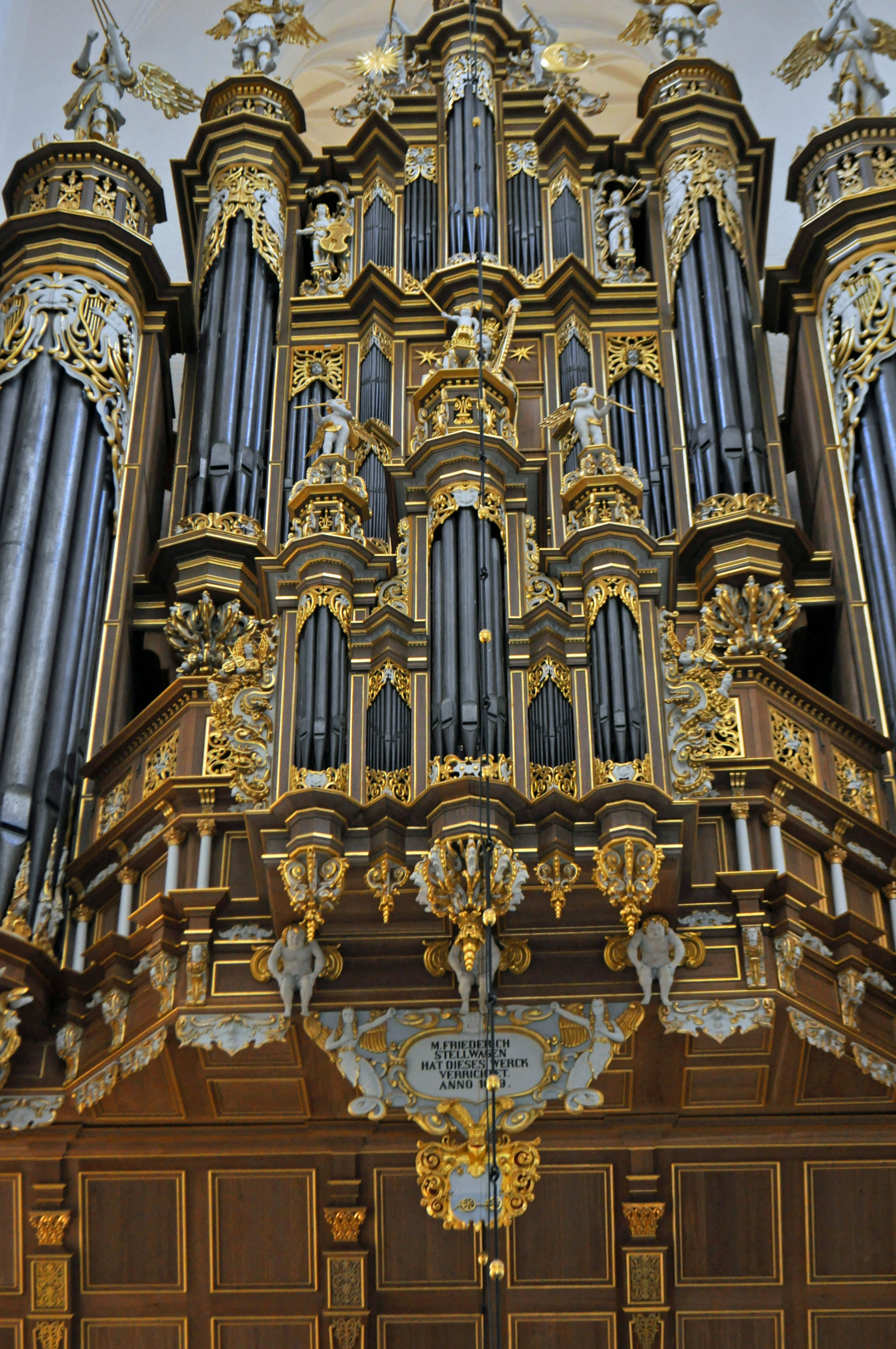 Foto aufgenommen in der Marienkirche in Stralsund am 7.7.2013. Stellwagen-Orgel Stralsund